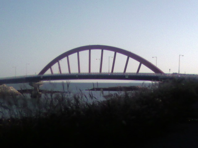 소랑대교